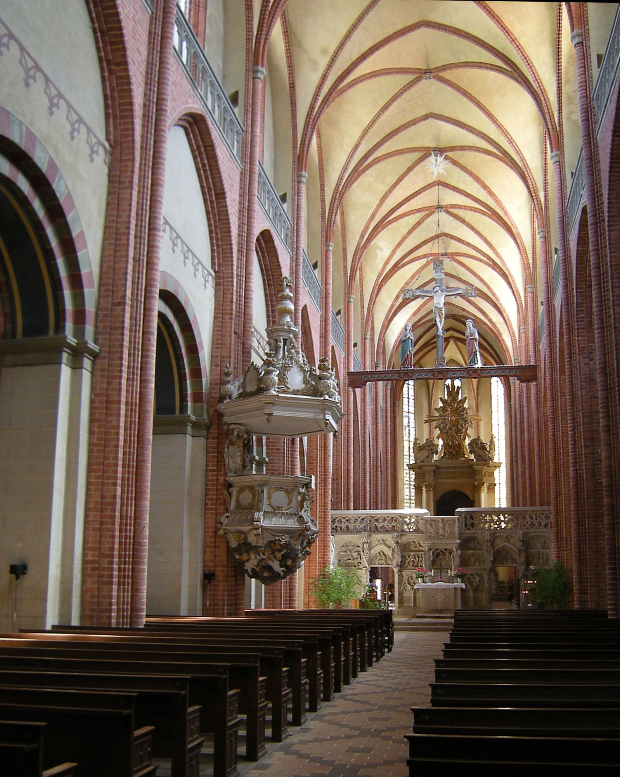 Havelberg-Kirchenschiff Dom St. Marien.jpg